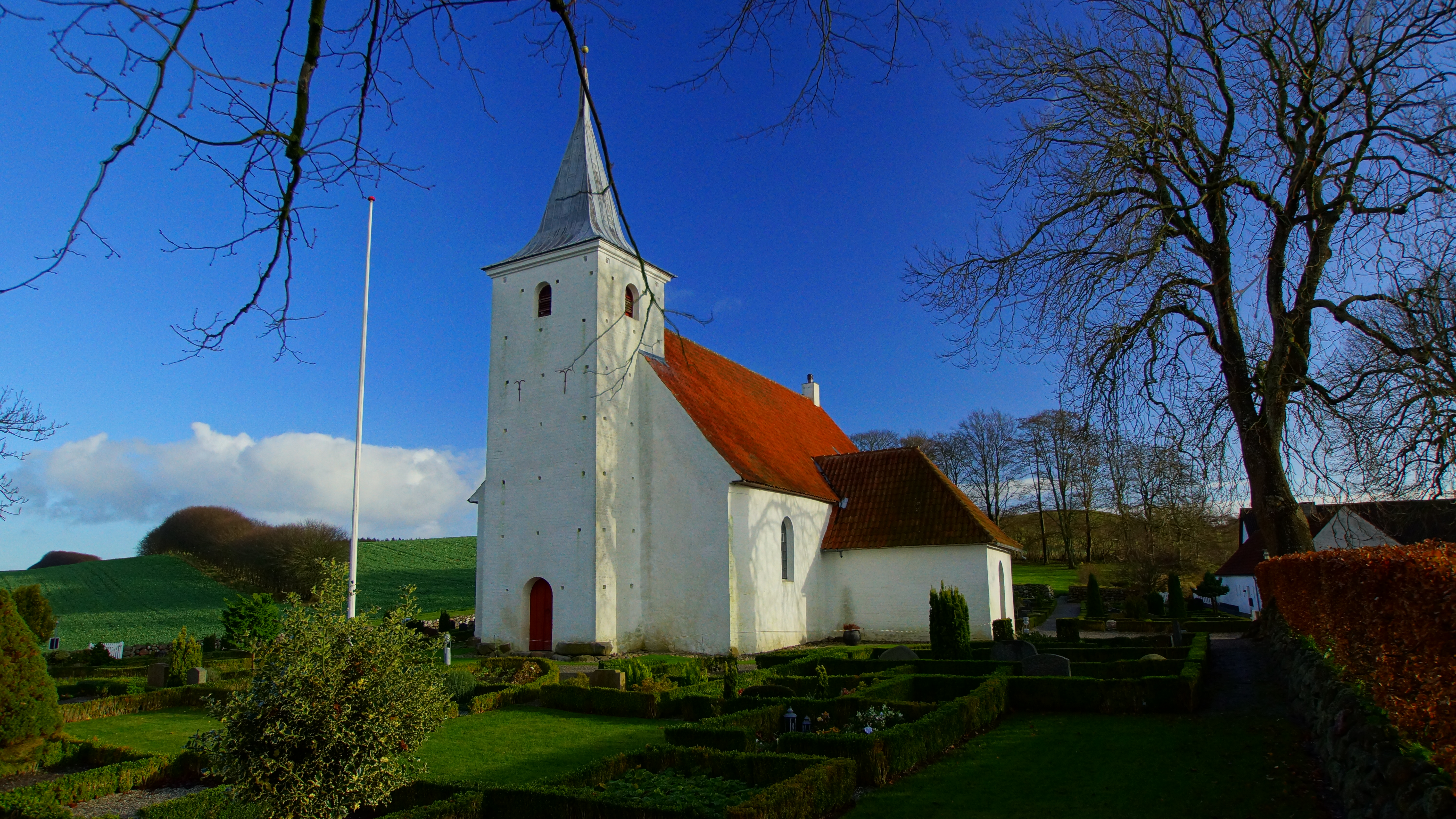 Agri Kirke